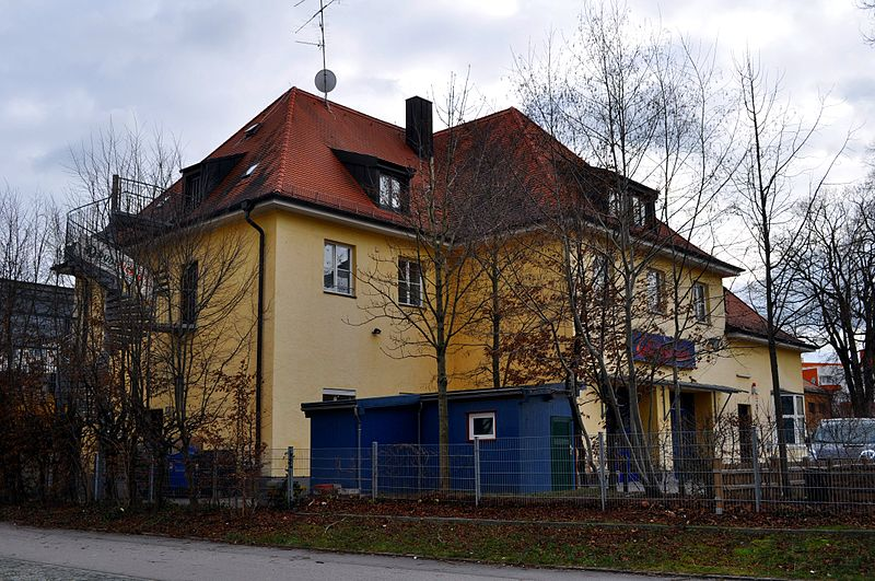 Sitz von buntkicktgut auf der Theresienhöhe